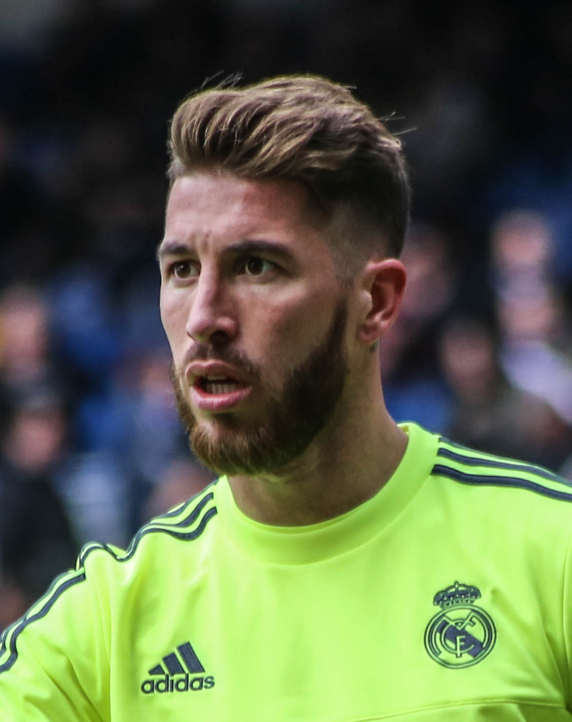 Sergio Ramos entrenando